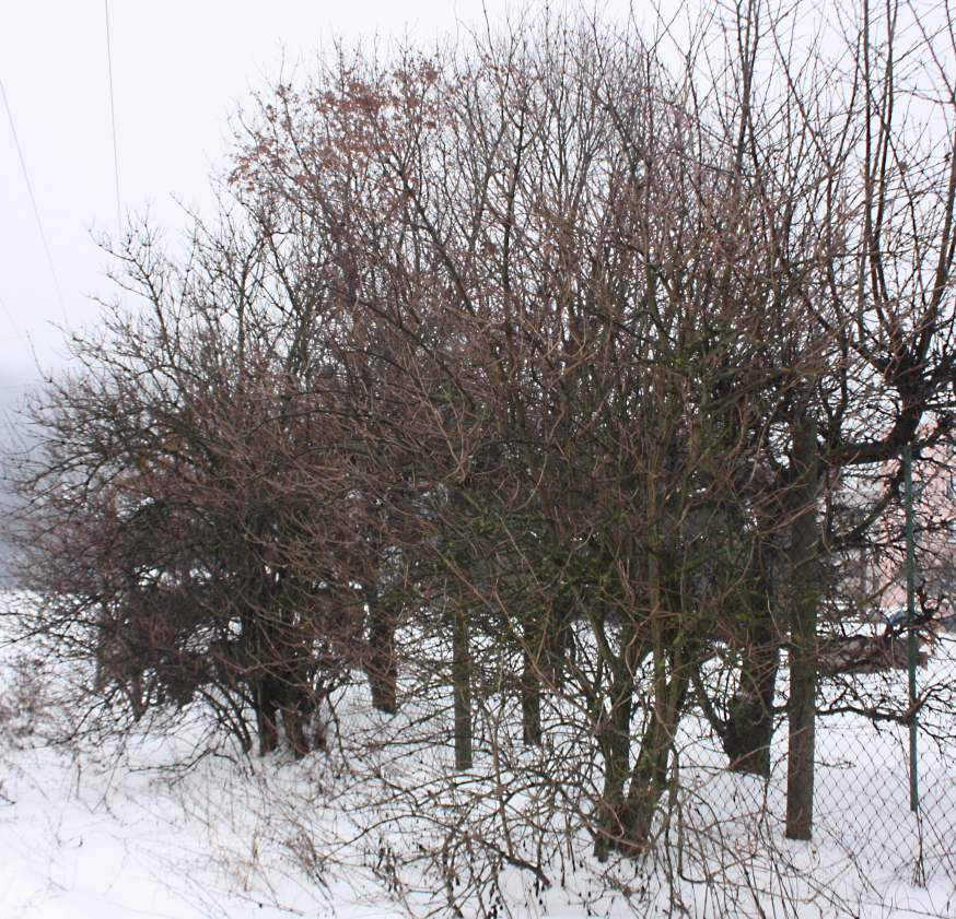 sambucus nigra u zahrádkářské kolonie